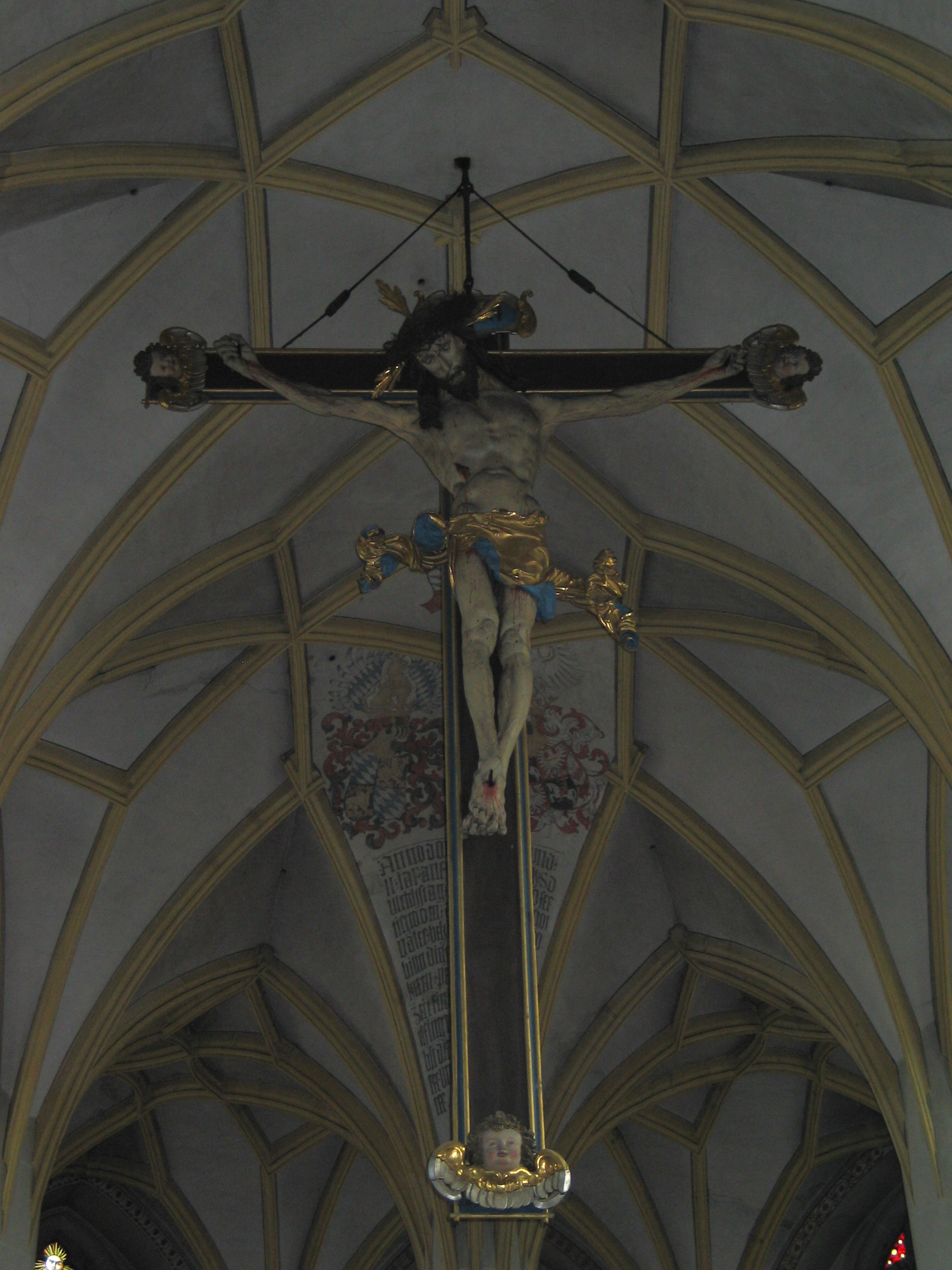 Dingolfing, Kath. Stadtpfarrkirche St. Johannes. Chorbogen-Kruzifix.